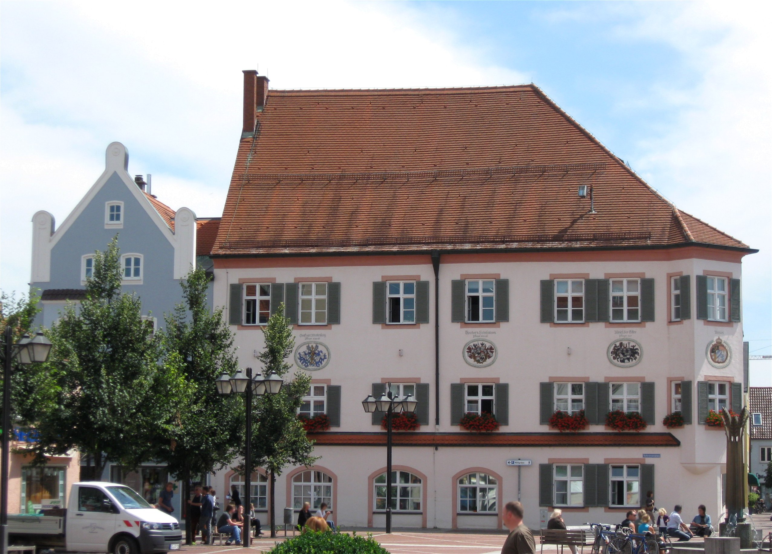 Erdinger Rathaus, Ehemalige Stadtresidenz der Grafen von Preysing